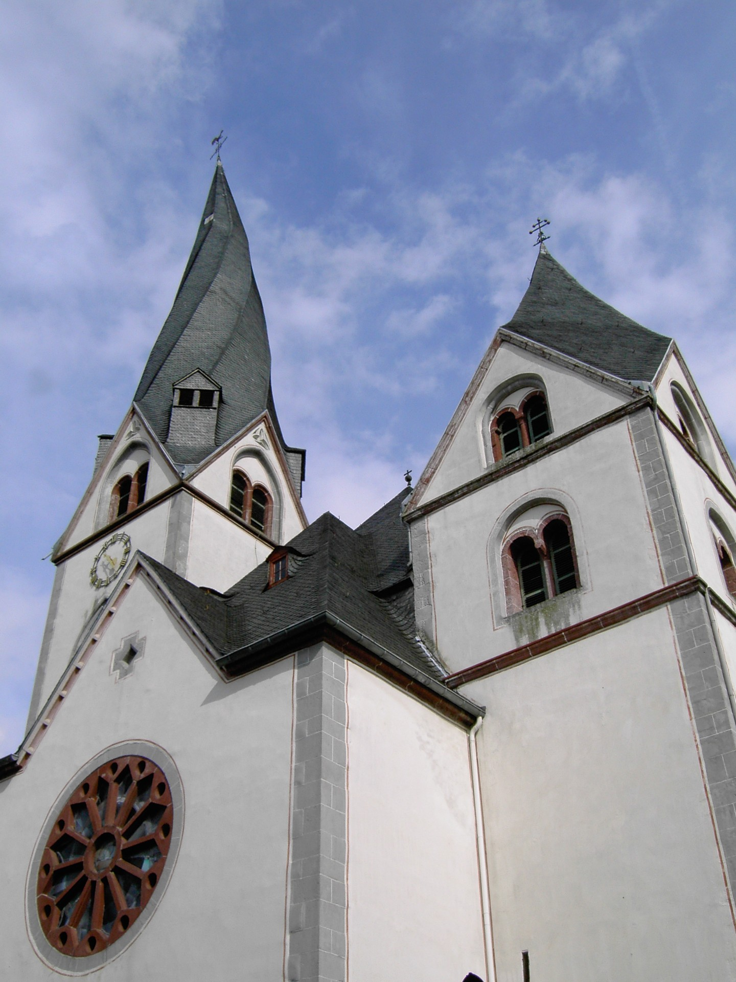 Sankt Clemens in Mayen (selbst fotografiert / gemeinfrei)